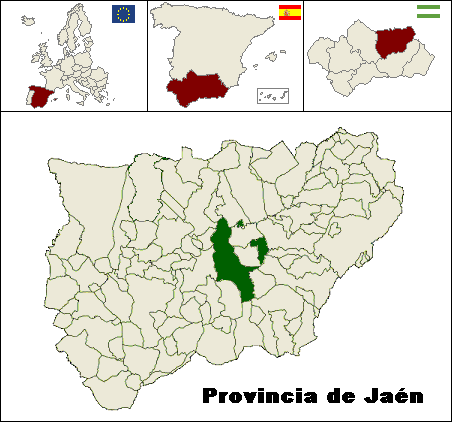 Mapa de localización del municipio de Ubeda (Jaén, España)